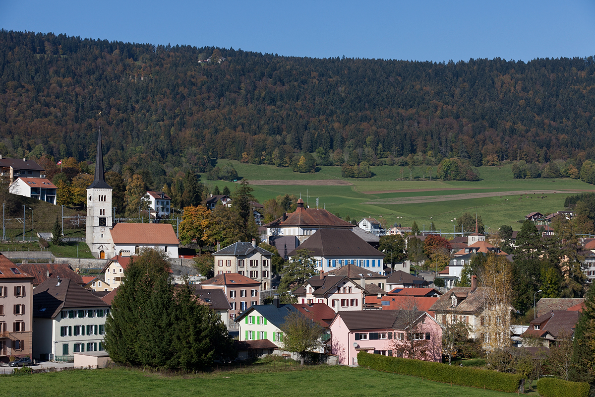 Blick auf Travers: Kirche, Schulhaus, Schloss und Temple